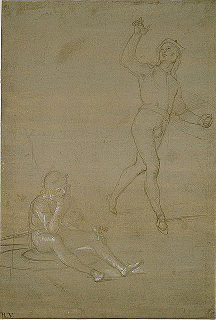 Rafael Sanzio (Urbino, Itália, 1483 - Roma, Itália, 1520) "Estudo de Dois Soldados para a Ressurreição de Cristo" Desenho; 32 x 22 cm. Acervo do Ashmolean Museum, Oxford (Reino Unido)